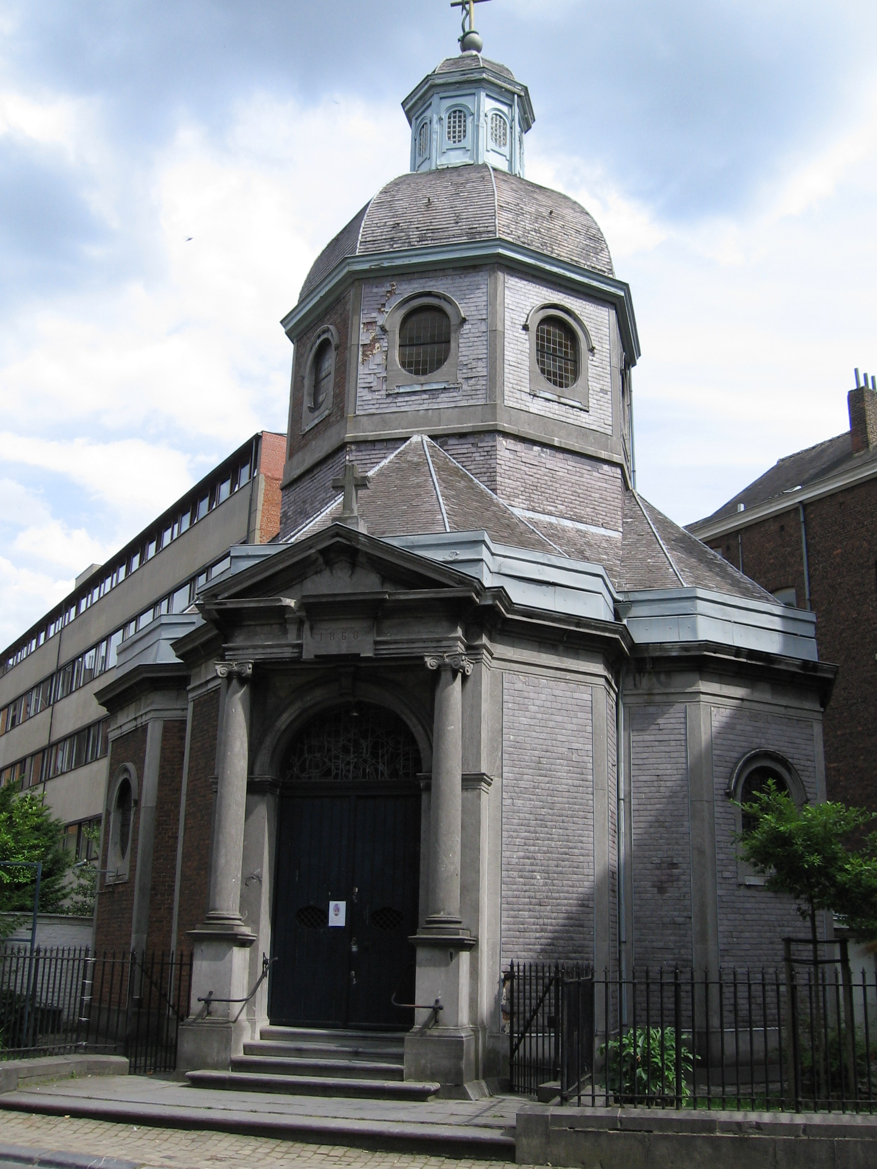 Chapelle Notre-Dame du Rempart (face au parc Marie-Louise), à Namur